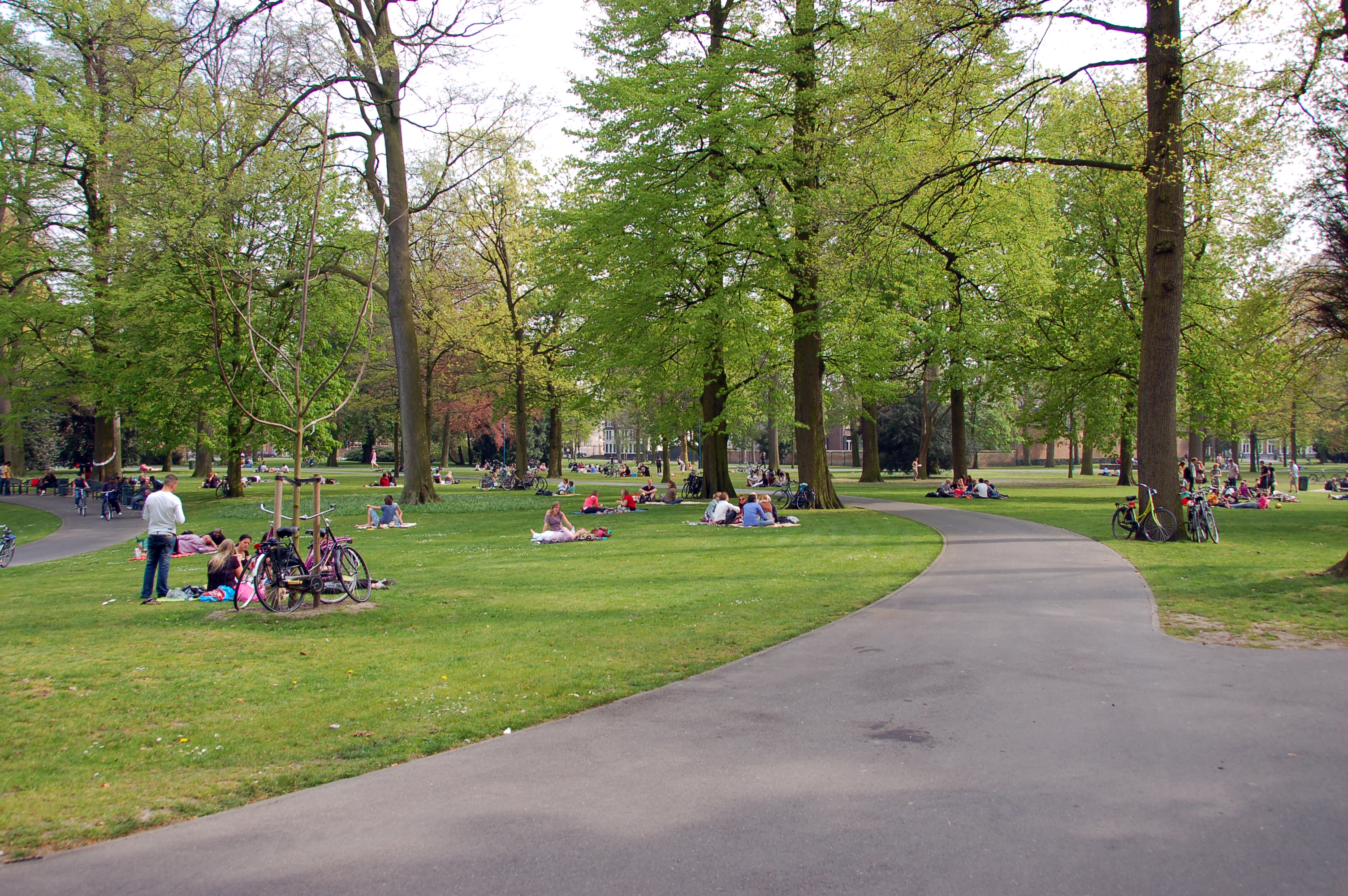 Park Valkenberg in Breda, Niederlande